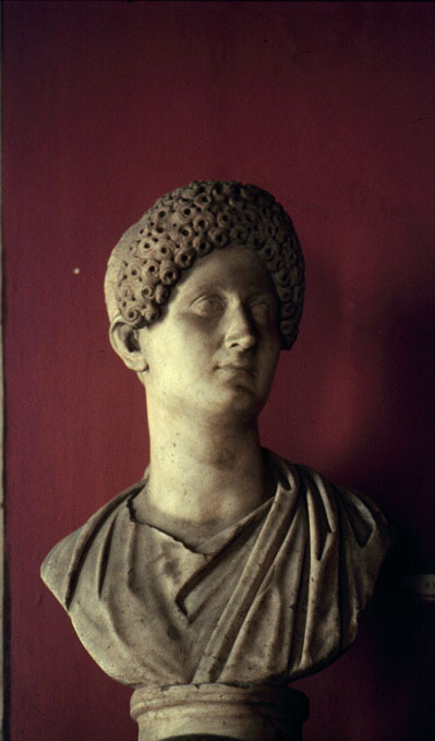 Domizia Longina, Musei Capitolini, Roma